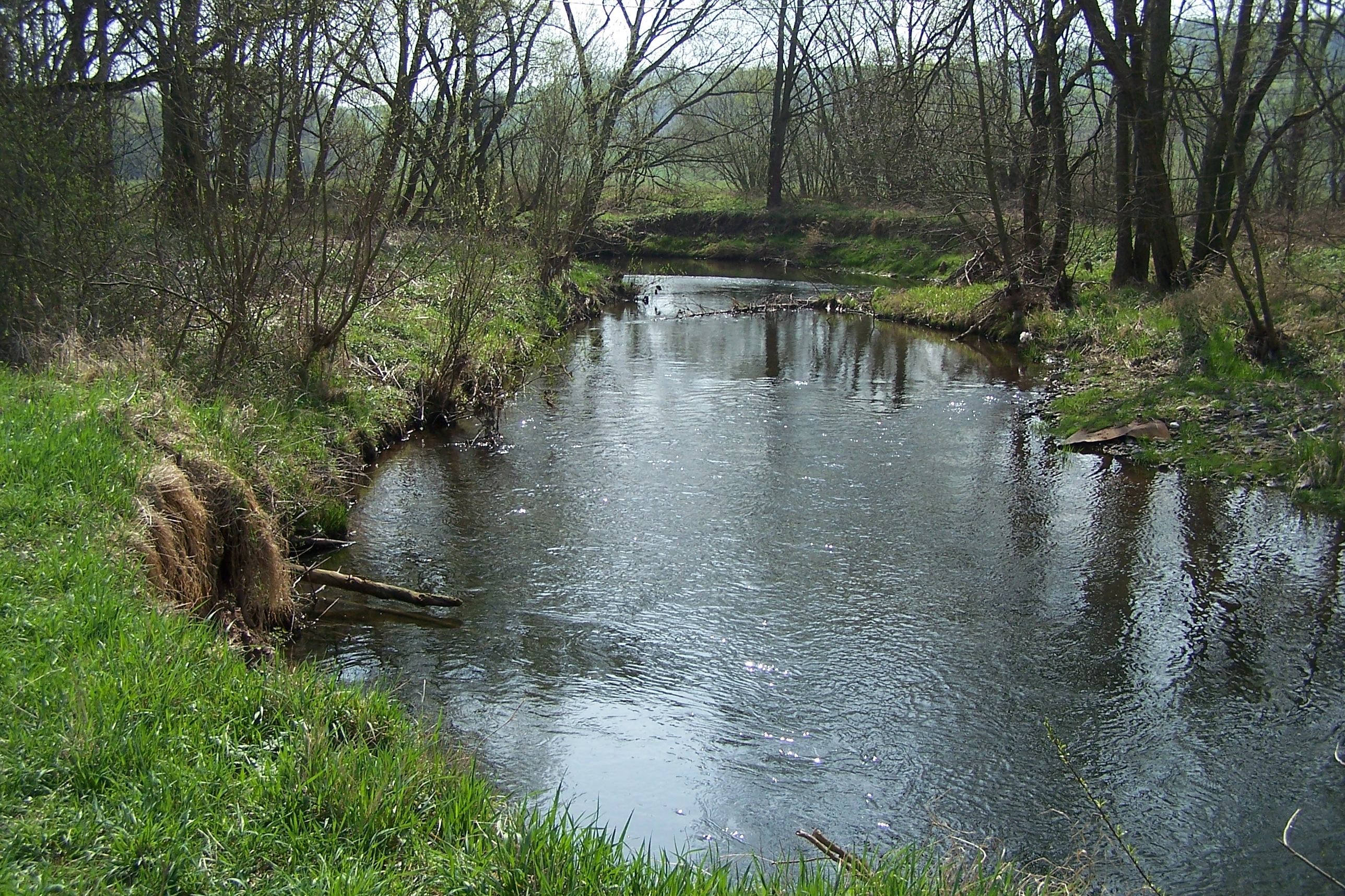 Am Flussufer der Hörsel zwischen Wutha-Eichrodt und Eisenach-Rothenhof.